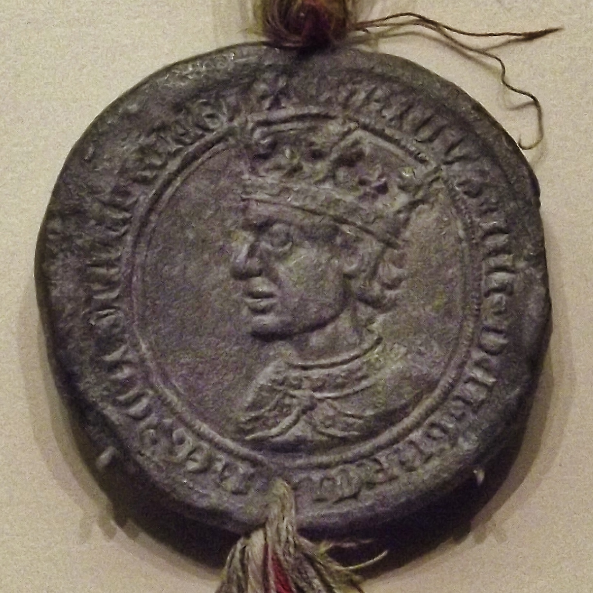 Sello de Enrique IV de Castilla y León